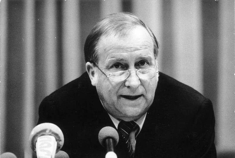 ADN-Thomas Lehmann /21.8.90/Berlin: Ber neue Mann an der Spitze der Treuhandanstalt heißt Detlev Rohwedder. Vor Journalisten verwies er aber darauf, daß er erst noch auf der nächsten Sitzung des Verwaltungsrates in der kommenden Woche als Präsident der Treuhandanstalt bestätigt werden müsse. Rohwedder betonte, die Anstalt dürfe auch künftig nicht als eine Art "Heilsbringer" für die DDR-Wirtschaft angesehen werden. Weder er noch Ex-Präsident Gohlke seinen in der Lage , durch "Handauflegen" die Probleme zu lindern.